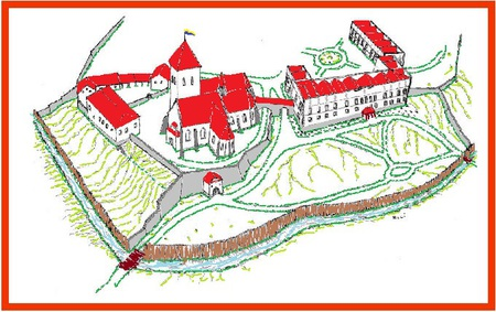 Rekonstrukční kresba Fryštátského hradu v Karviné na základě historického popisu a dochovaných staveb